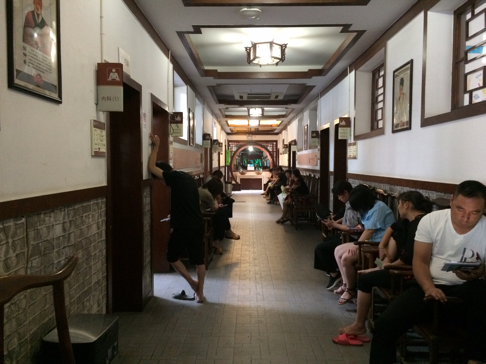 中文（中国大陆）: 玉环市中医院